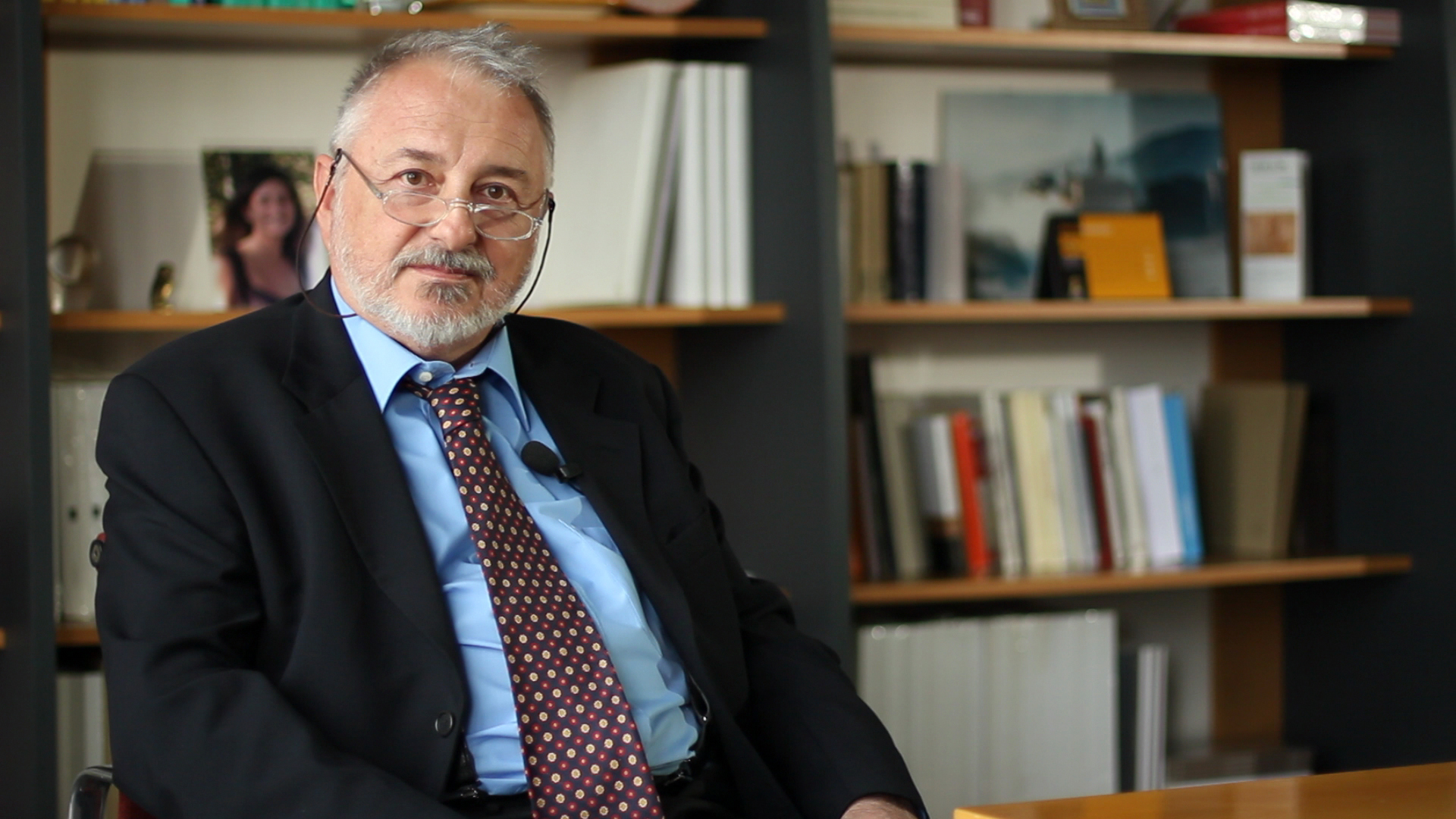 Mario Negri